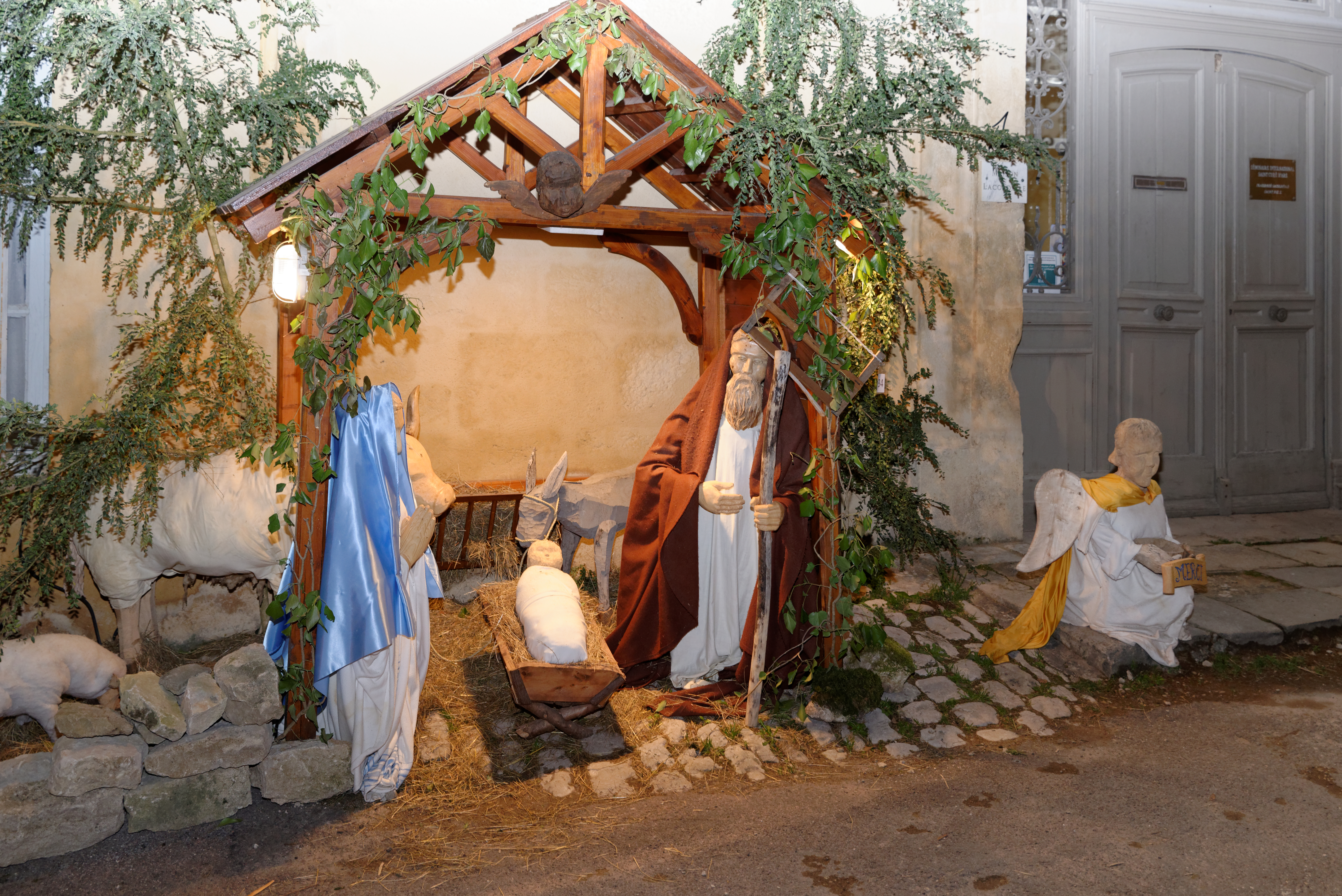 Crèche à Flavigny-sur-Ozerain (Côte d'Or, Bourgogne-Franche-Comté, France).